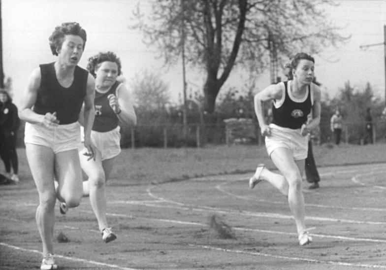 Bärbel Mayer, Budnig, Ingeborg Krause Zentralbild Wendorf bey.-ot. 5.5.1957 Leichtathletik-Bahnsaison eröffnet. In allen Bezirken der DDR wurde am Sonntag, dem 5.5.1957, die Leichtathletik-Bahnsaison eröffnet. In Berlin trafen sich die Sportfreunde in Adlershof, um die ersten Sieger des Jahres 1957 zu ermitteln. UBz: Während des 100 m Vorlaufes der Frauen. Wir erkennen von links nach rechts: Bärbel Mayer (Dynamo Berlin), Budnig (Einheit) und Ingeborg Krause (SC Rotation).